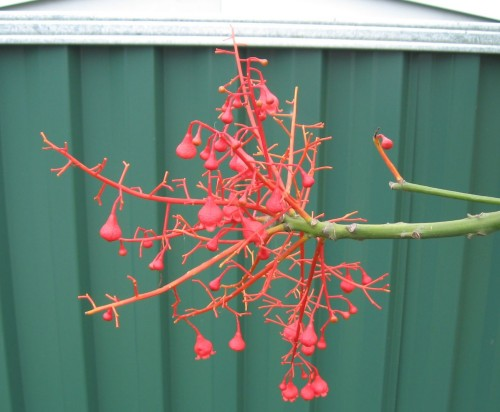 Fleurs de Brachychiton